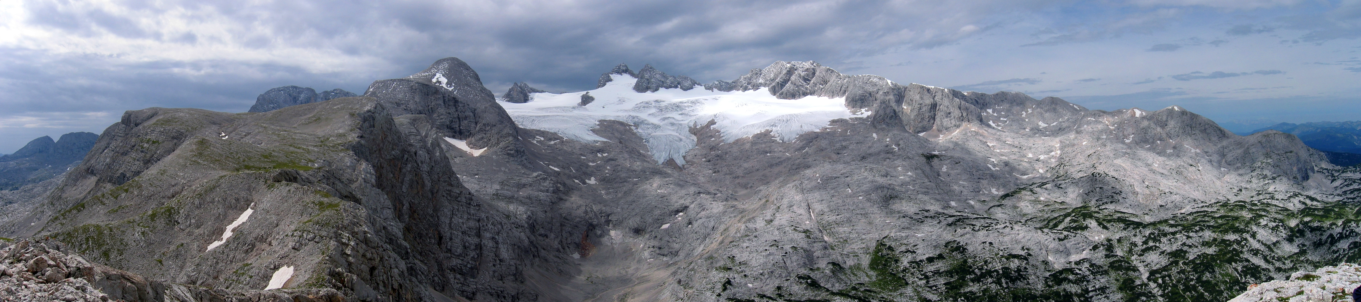 Dachstein Panorama mit Hallstättergletscher, aufgenommen am Taubenkogel, Dachsteinplateau, Österreich. Von links nach rechts: im Vordergrund der Vordere Gjaidstein, dahinter der Hohe Gjaidstein, Dirndln, Hoher Dachstein, Niederer Dachstein, Steinerscharte und Hohes Kreuz